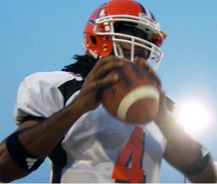 Omar Jacobs